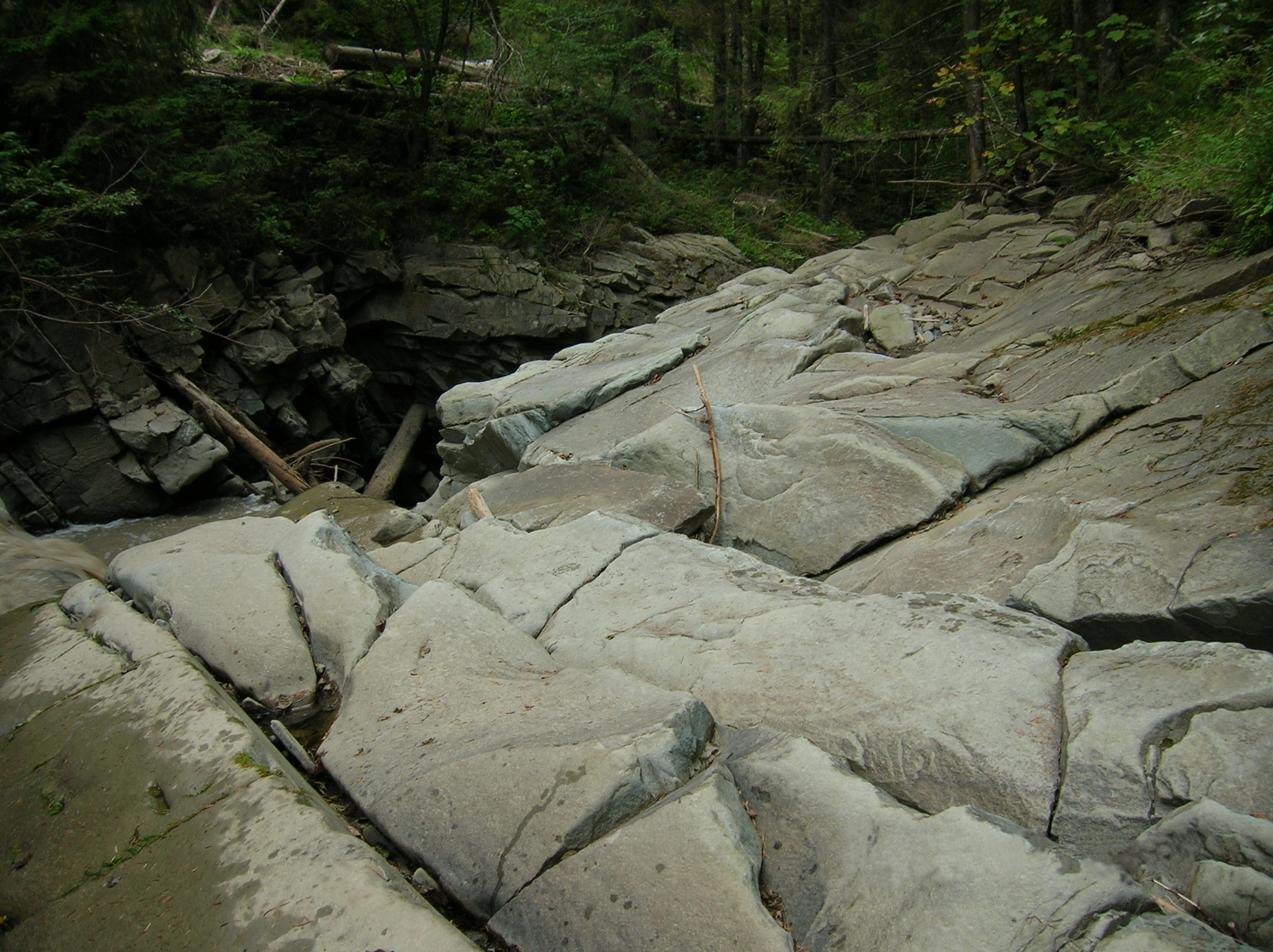 Munţii Tarcăului (Carpaţii Orientali, România)-Platformă de gresie lângă cascada din defileul superior al Bolovănişului